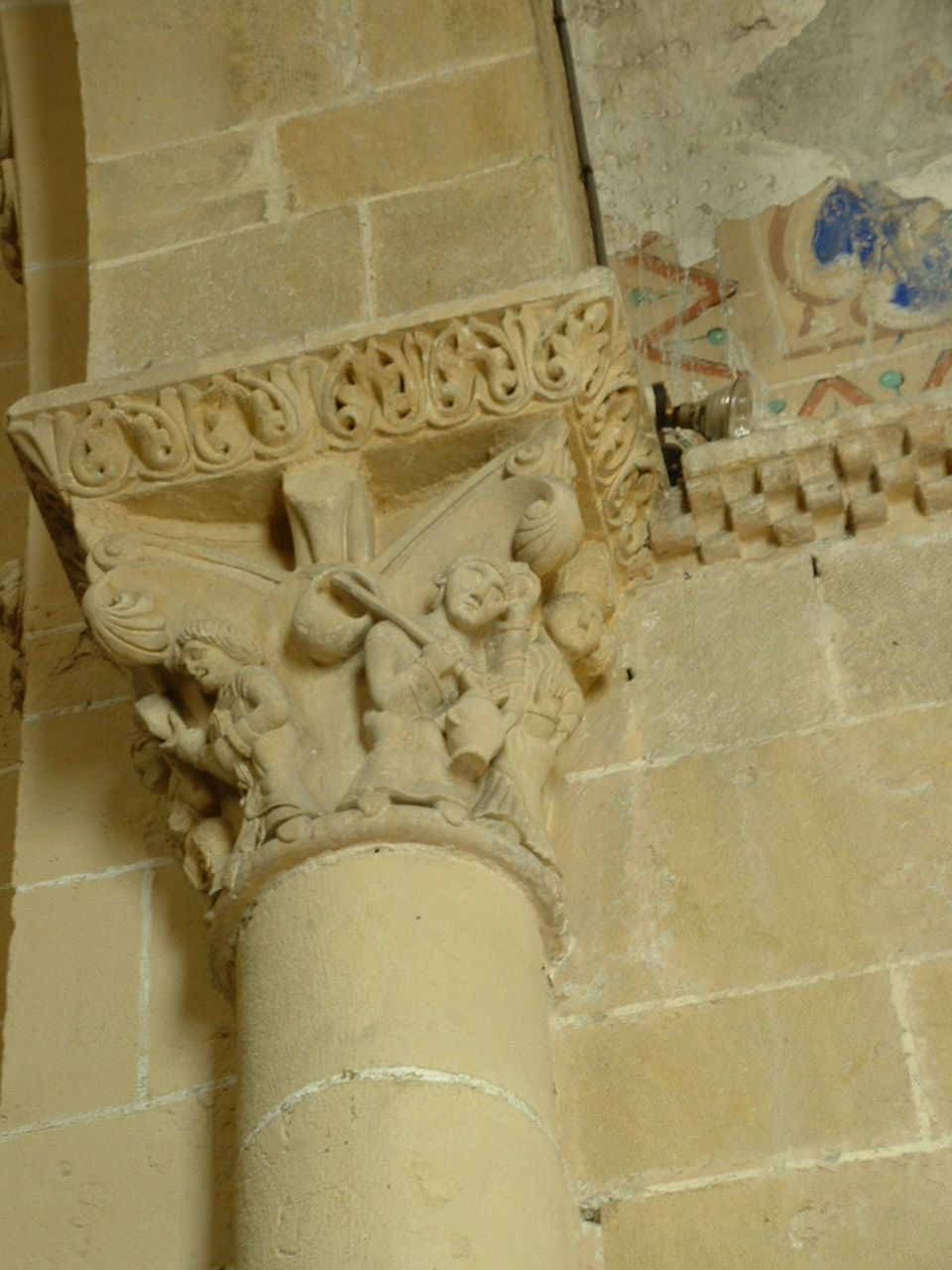 Foto de uno de los capiteles historiados de la catedral de Lescar (Pirineos Atlánticos, Francia), antigua sede episcopal de la provincia de Bearn.